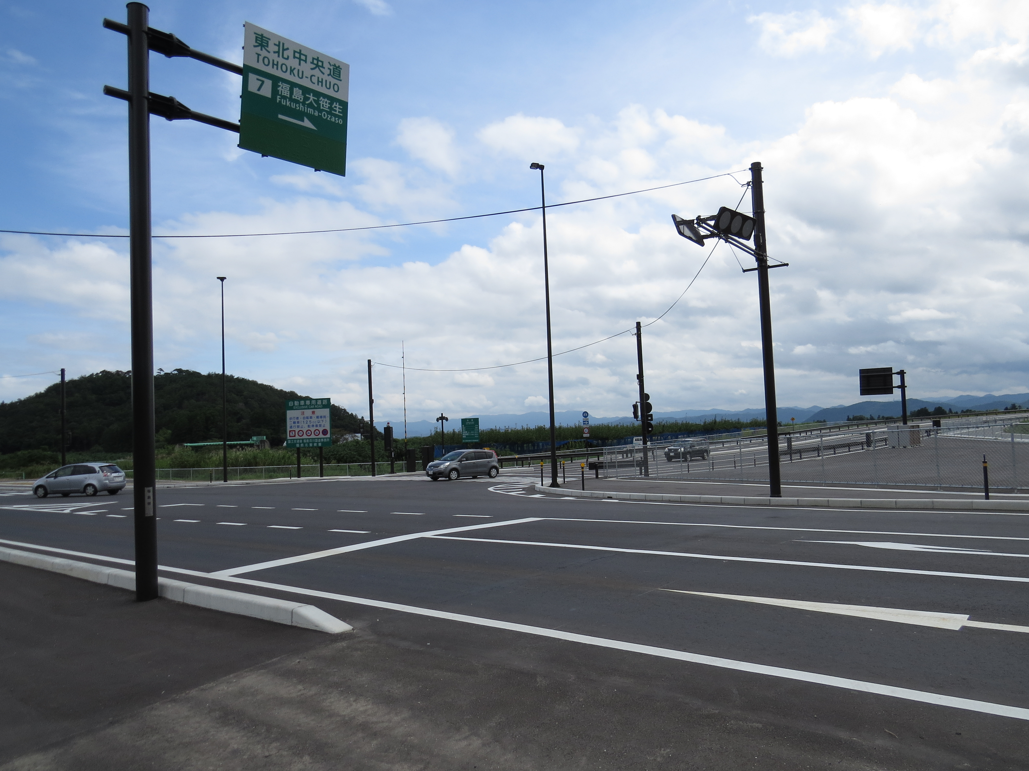 東北中央自動車道 福島大笹生IC 出入口